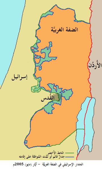 الجدار الإسرائيلي العازل في الضفة الغربيَّة، خِلال شهر أيَّار (مايو) سنة 2005م.